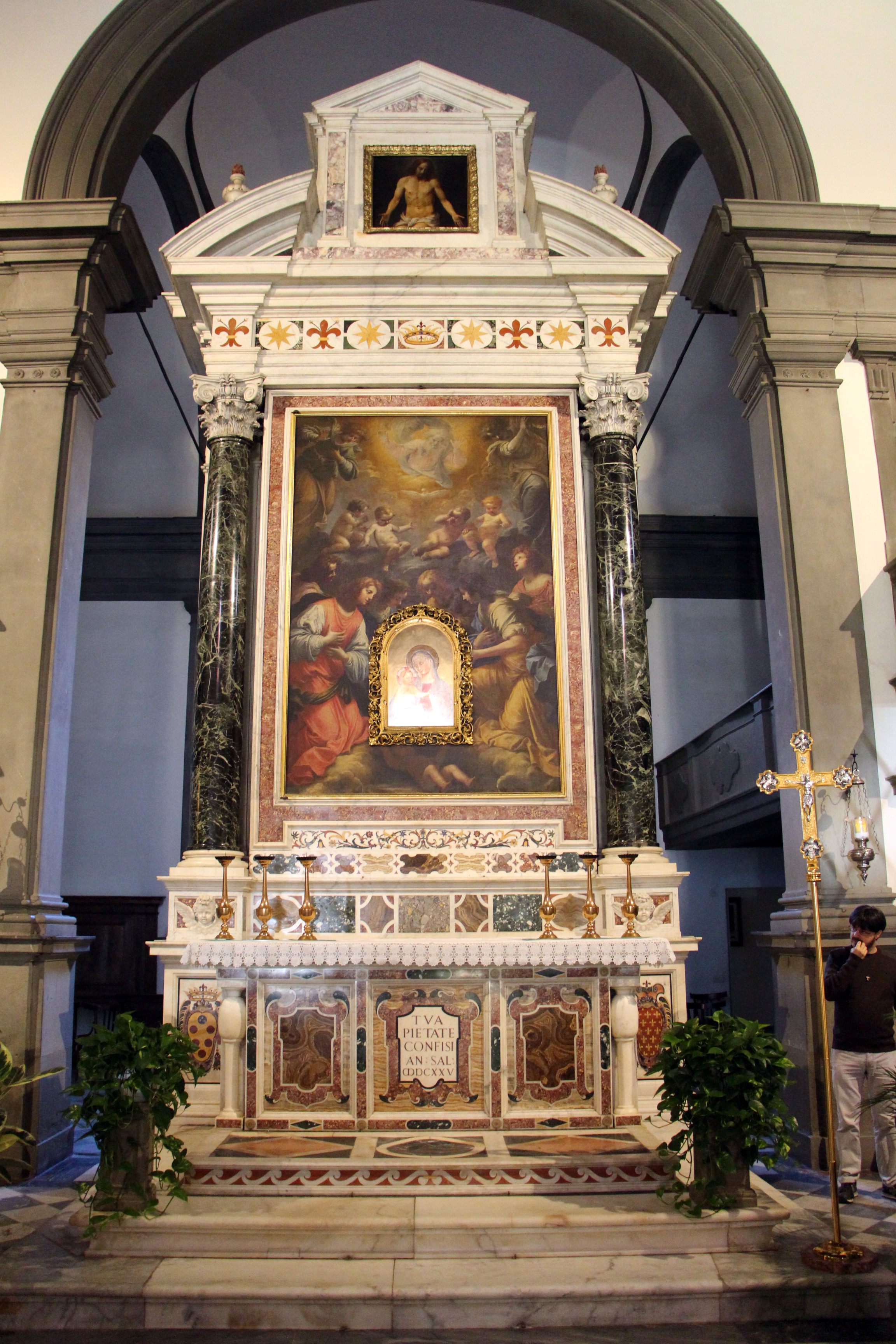 Santa Maria della Pietà (Prato)